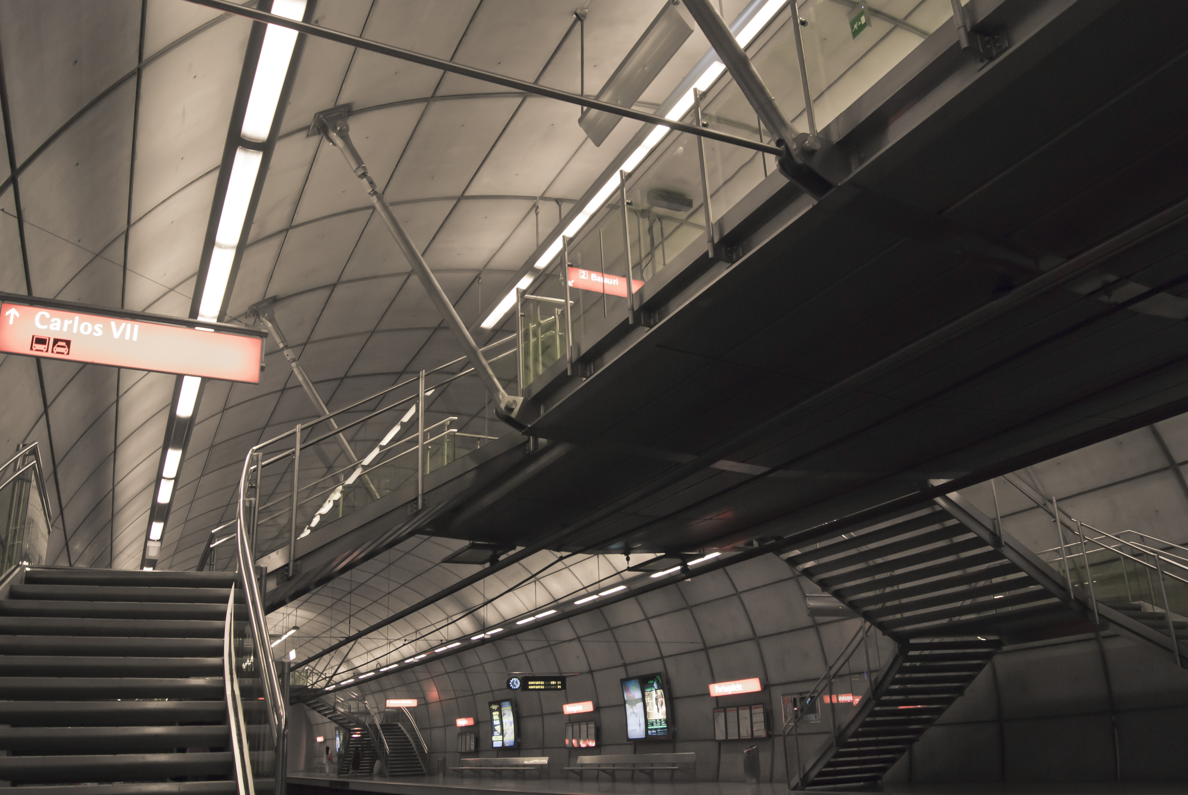 Spider